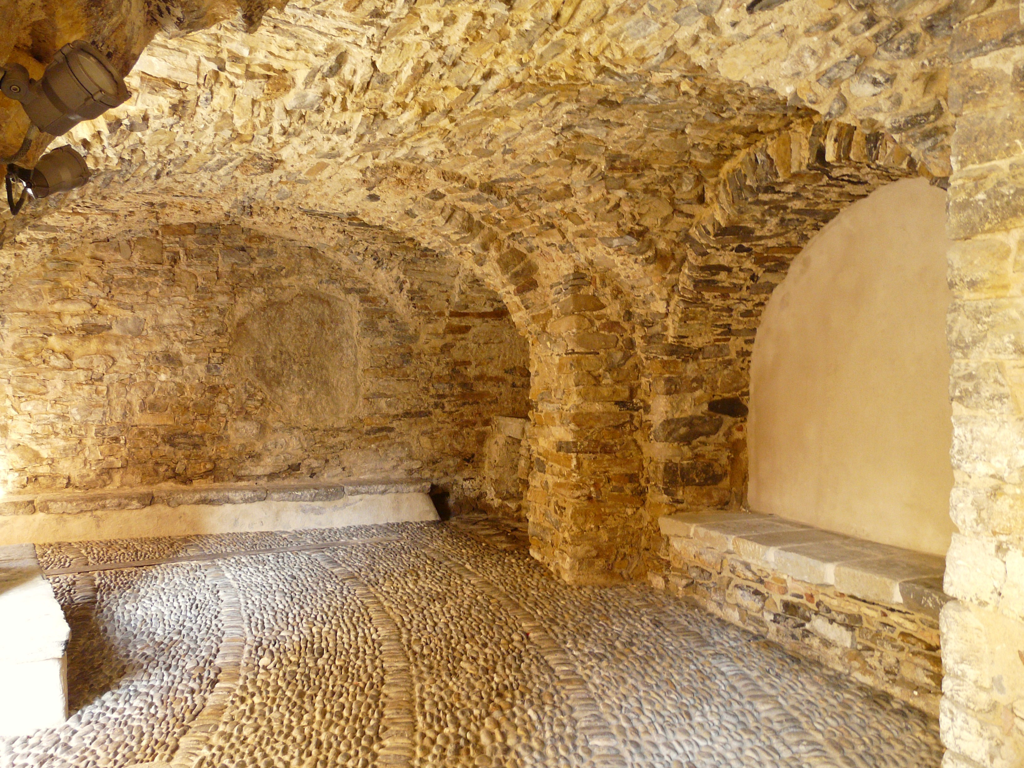 Loggia del centro storico di Vallebona, Liguria, Italia